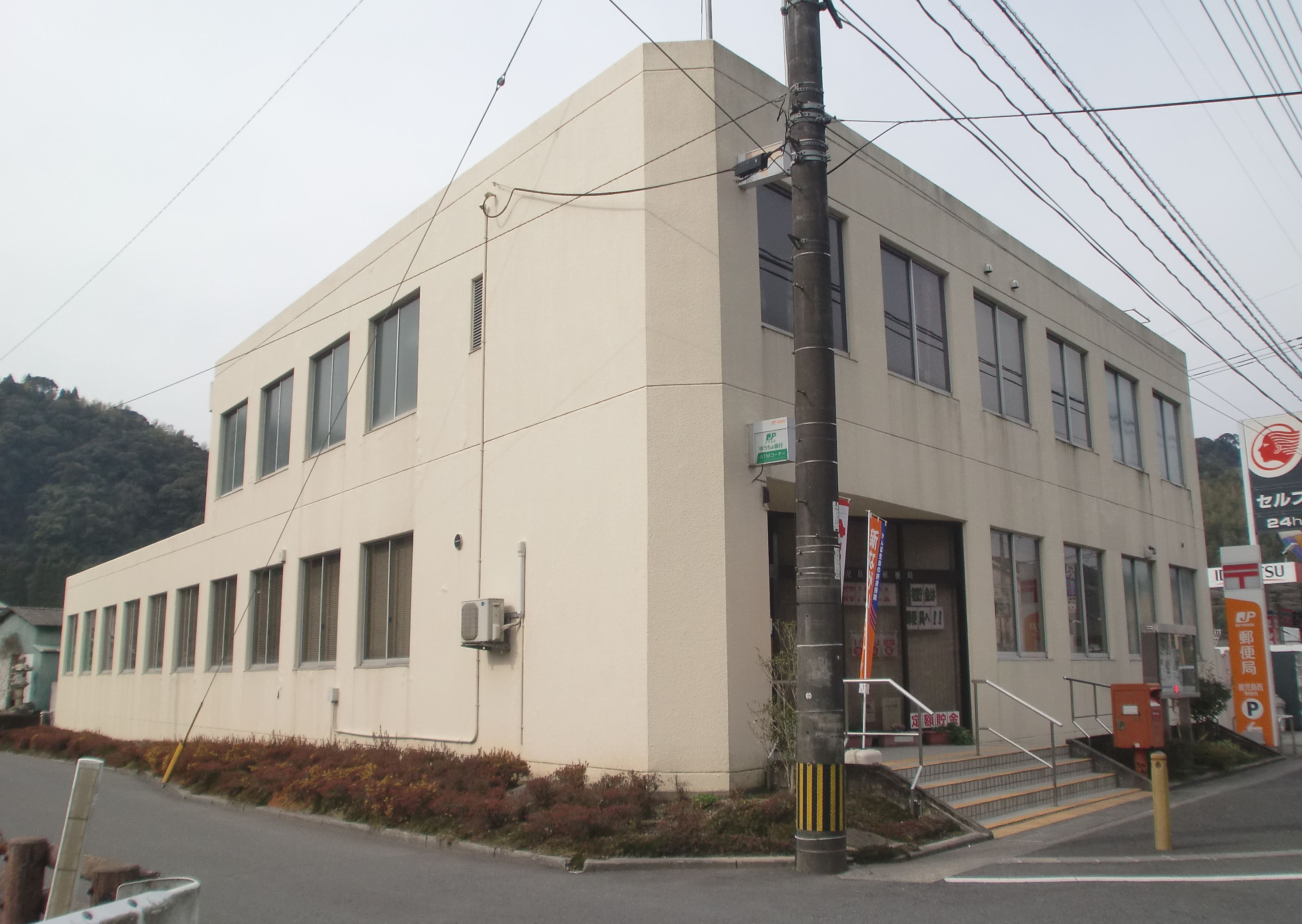 鹿児島西郵便局（鹿児島県鹿児島市小山田町）の外観。